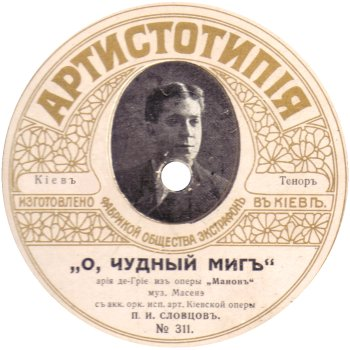 «Artistotipia» gramophone plate lable